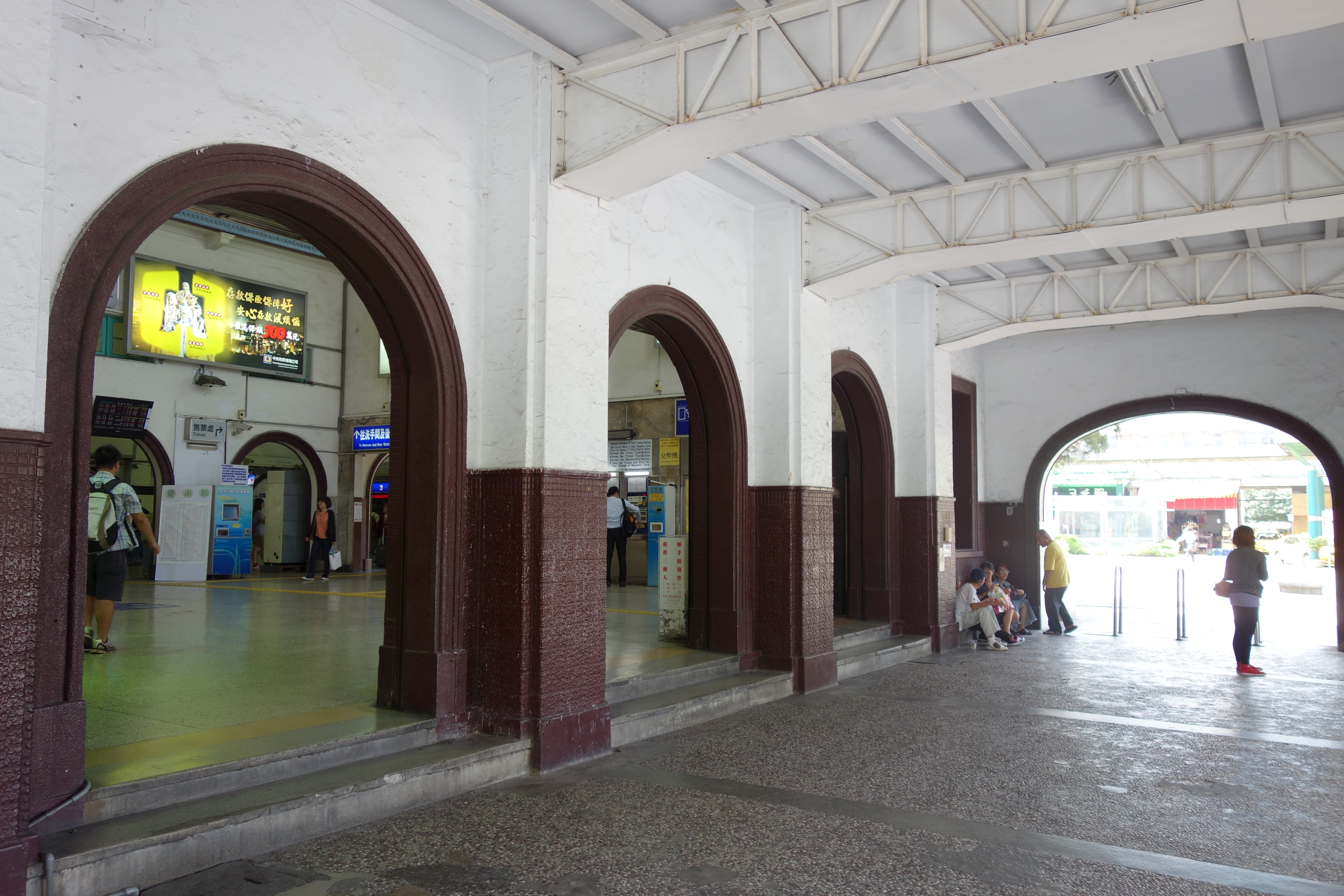 台鉄 台南駅 （前站） 駅舎エントランス